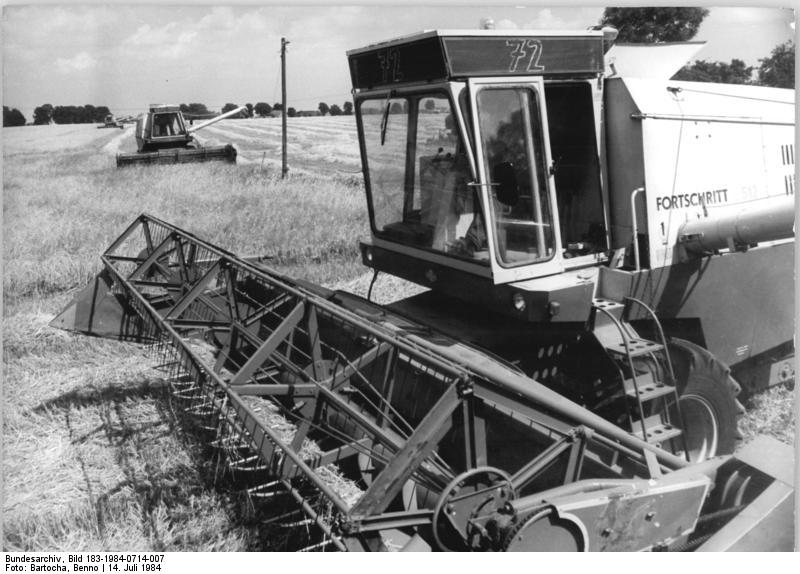 LPG Boldekow, Getreideernte ADN-ZB Bartocha 14.7.84 Bezirk: Neubrandenburg: Ernte. Die LPG und VEG des Bezirkes begannen mit der Mahd der Wintergerste. In der LPG (P) Boldekow (Kreis Anklam) sind von über 1400 Hektar Getreide und Ölfrüchte zu bergen, 29 Mähdrescher sind dazu eingesetzt.